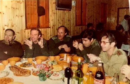 פרידה מראש אמ"ן, אלוף יהושע שגיא, מרץ 1983